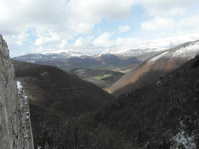 ROCCA MEDIOVALE RESTAURATA E AL CENTRO DI PERCORSI DA POCO TRACCIATI E PERCORRIBILI DA TUTTI. DA SCOPRIRE